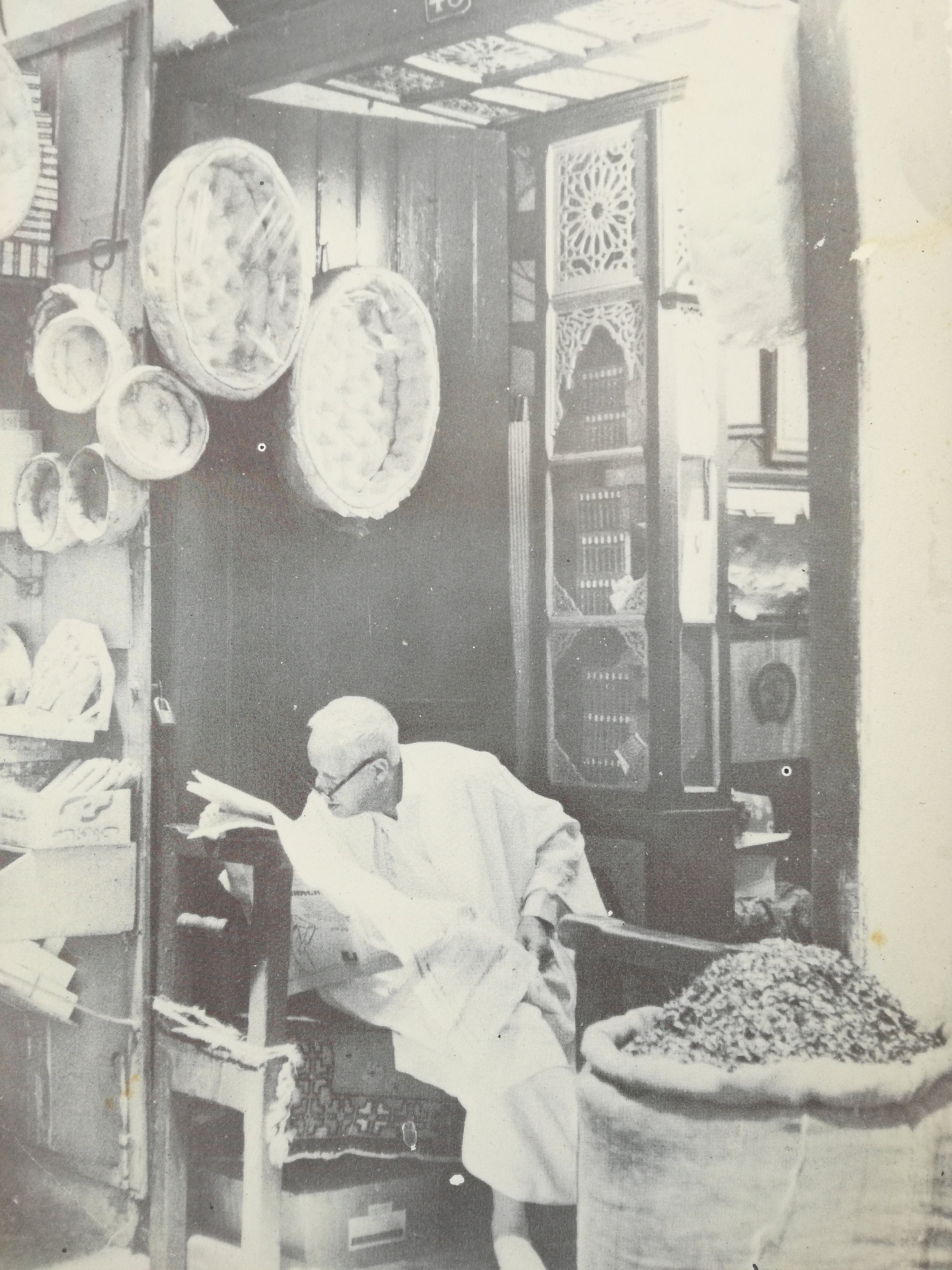 Vendor in Souk El Attarin